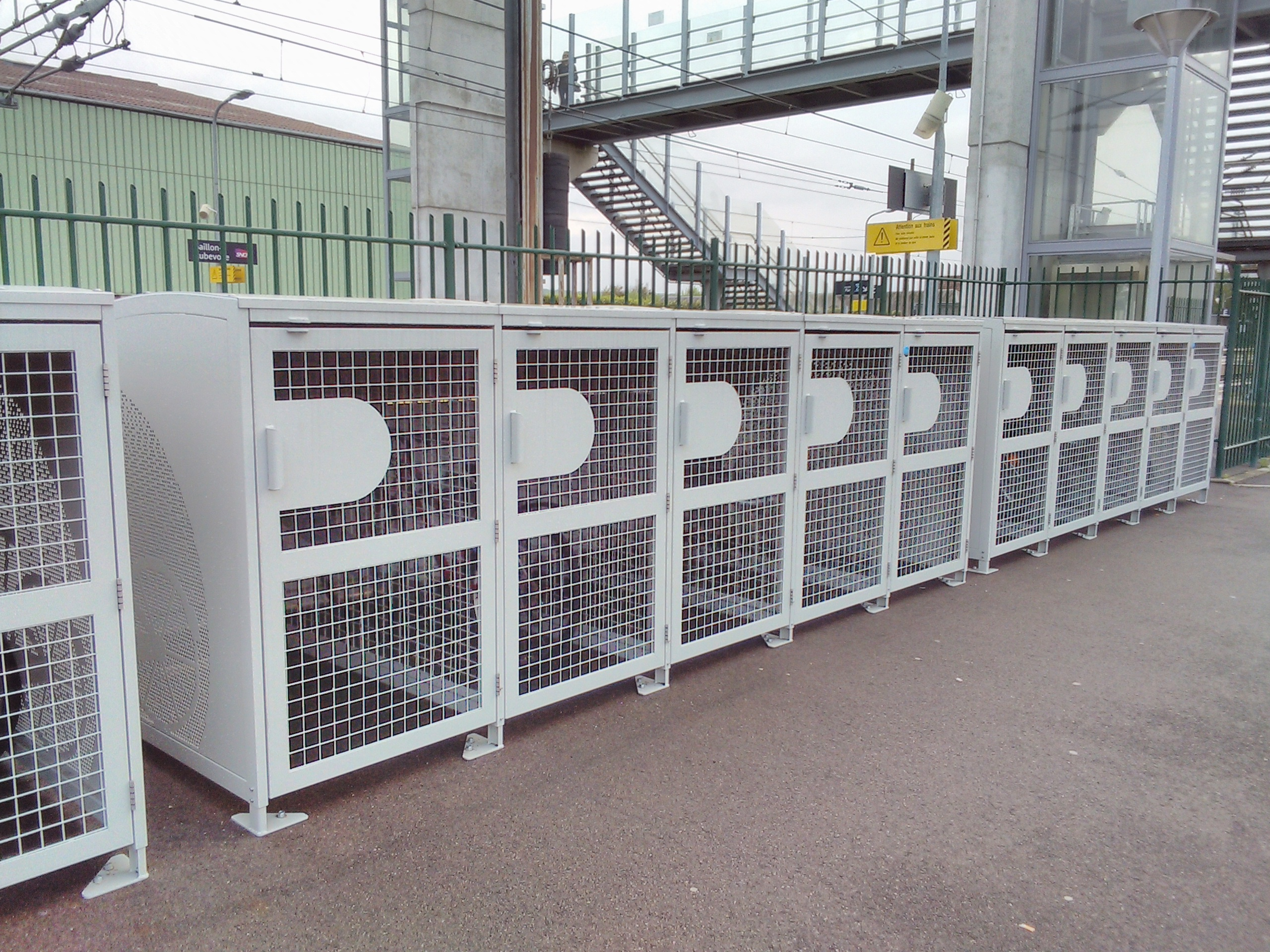 Trois blocs de cages à bicyclettes